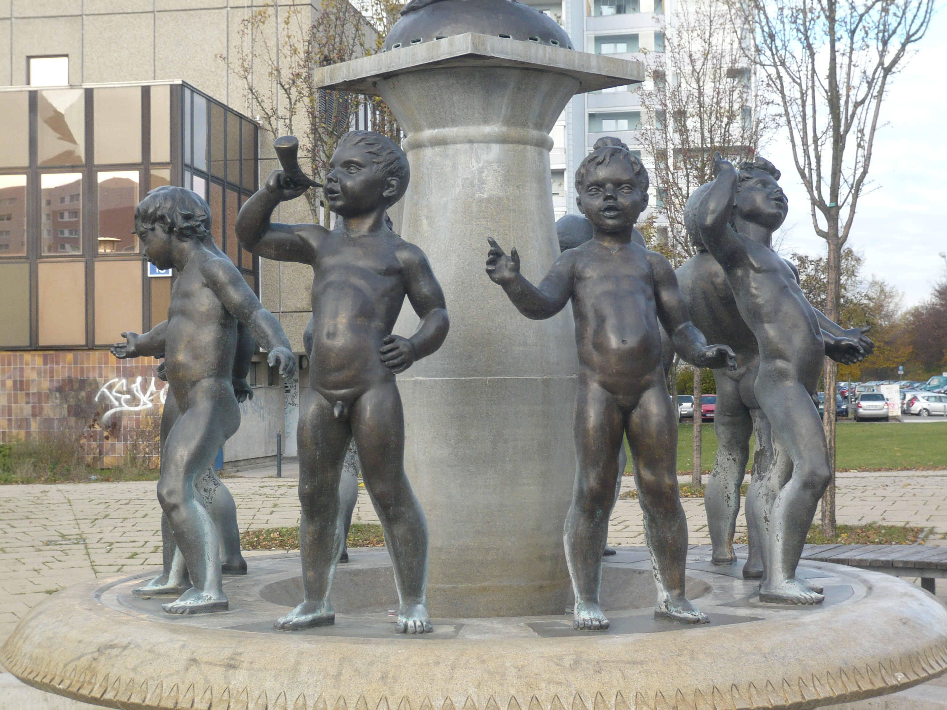 Brunnen der Jugend von Senta Baldamus im Ortsteil Neu-Hohenschönhausen